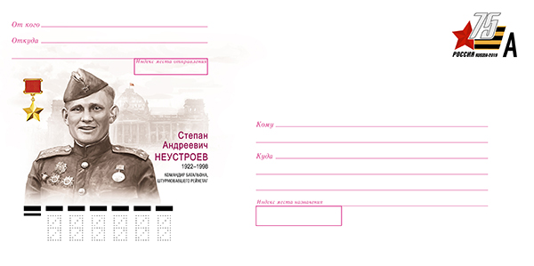 Неустроев Степан Андреевич, почтовый конверт